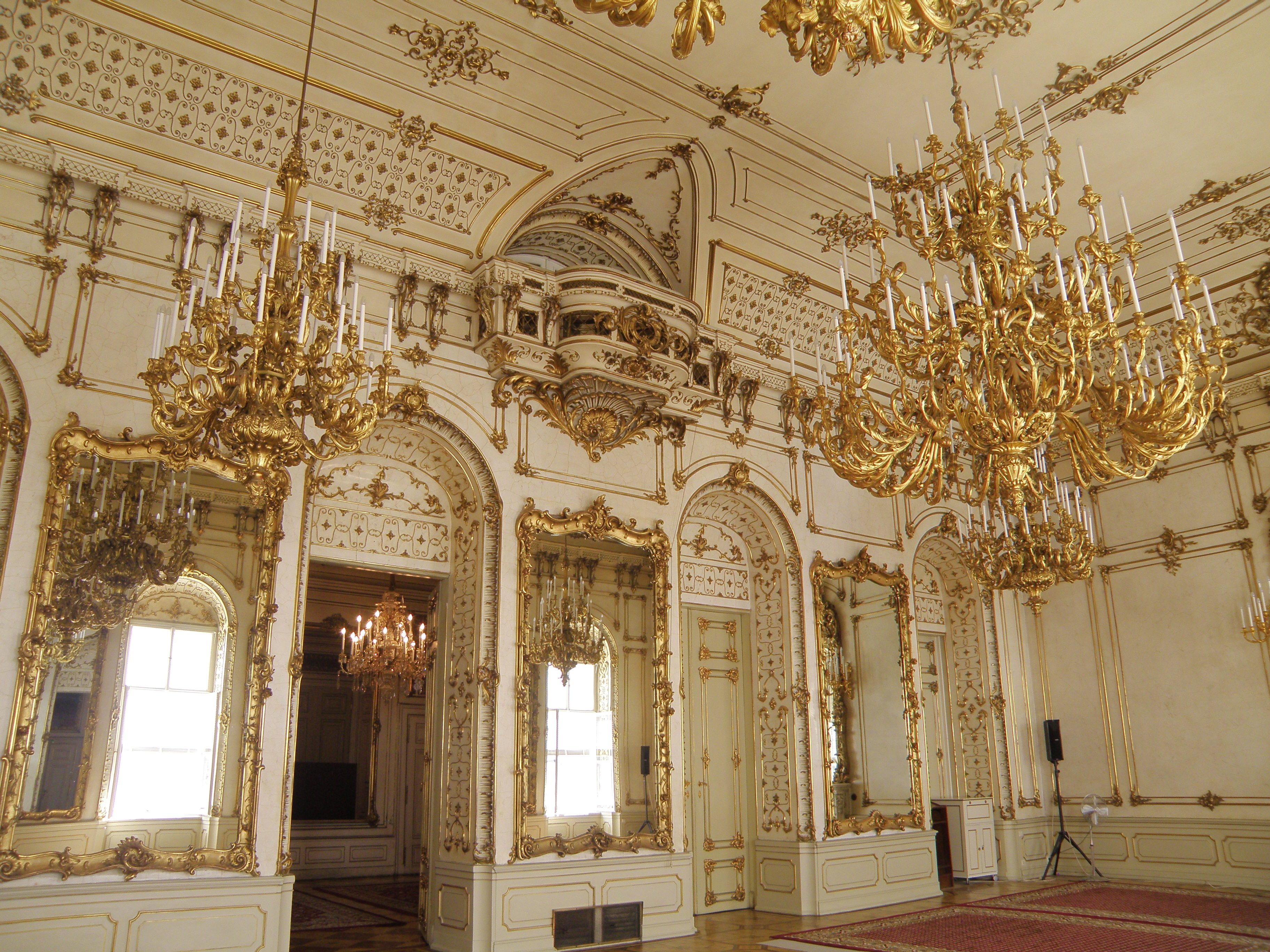 Ballsaal oder Festsaal